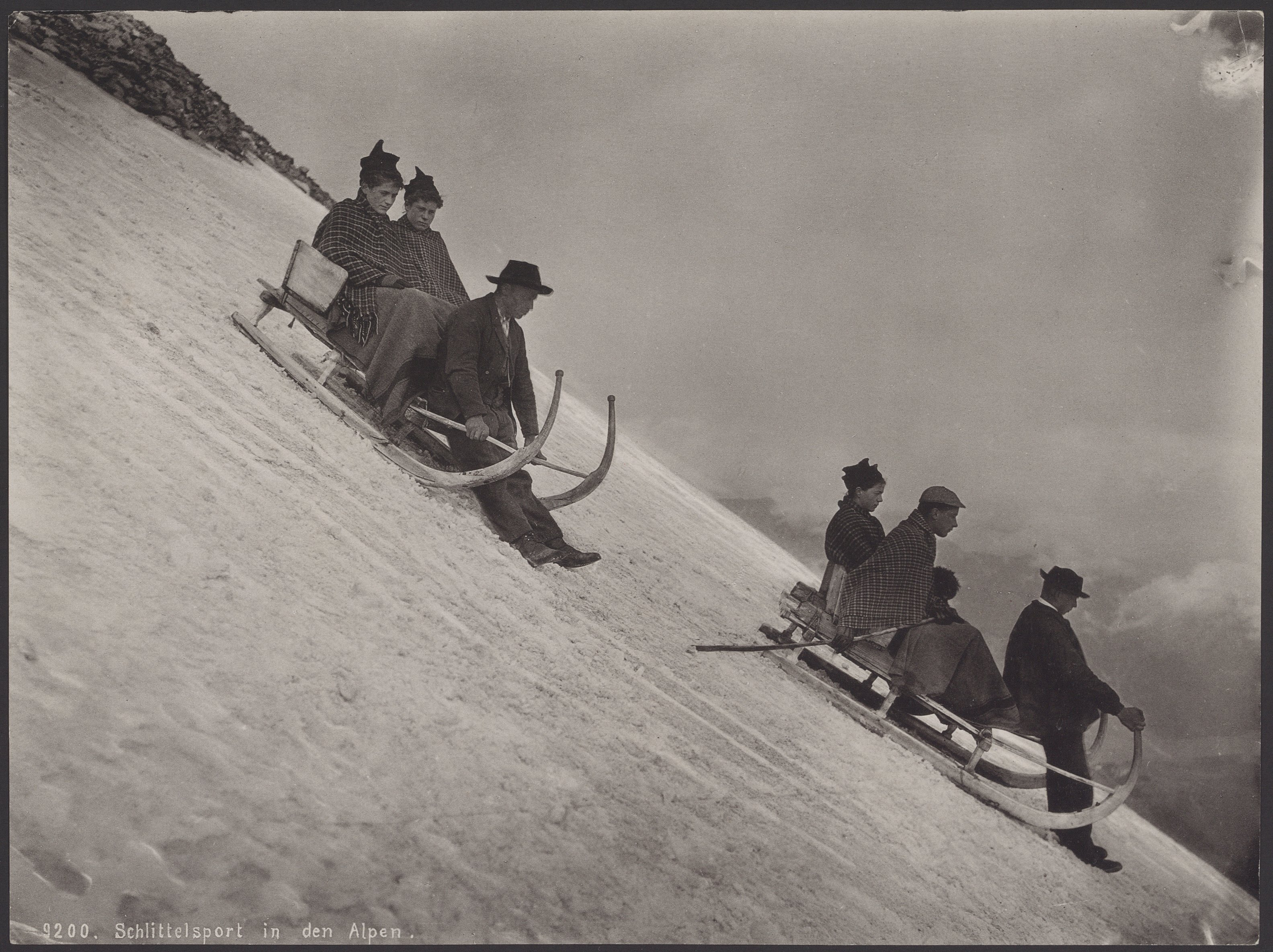 Das Foto ist eine Vorlage aus dem Archiv des Postkartenverlags Gebr. Künzli (1883-1966), Zürich. Nr. 9200, Unidentifizierbare Alp in den Schweizer Bergen, Rechter Rand ausgebleicht